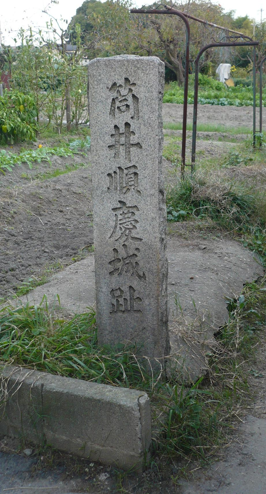 筒井城の石碑